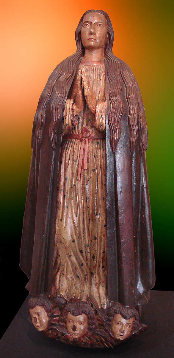 A Nossa Senhora da Conceição, século XVIII, importante exemplar de Arte Missioneira pertencente ao acervo do Museu Júlio de Castilhos, em Porto Alegre, Brasil.